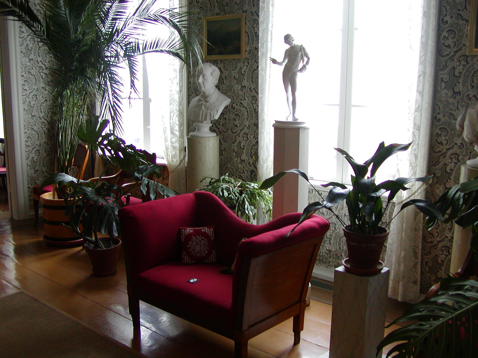 Home museum of Johan Ludvig Runeberg in Porvoo, Finland.